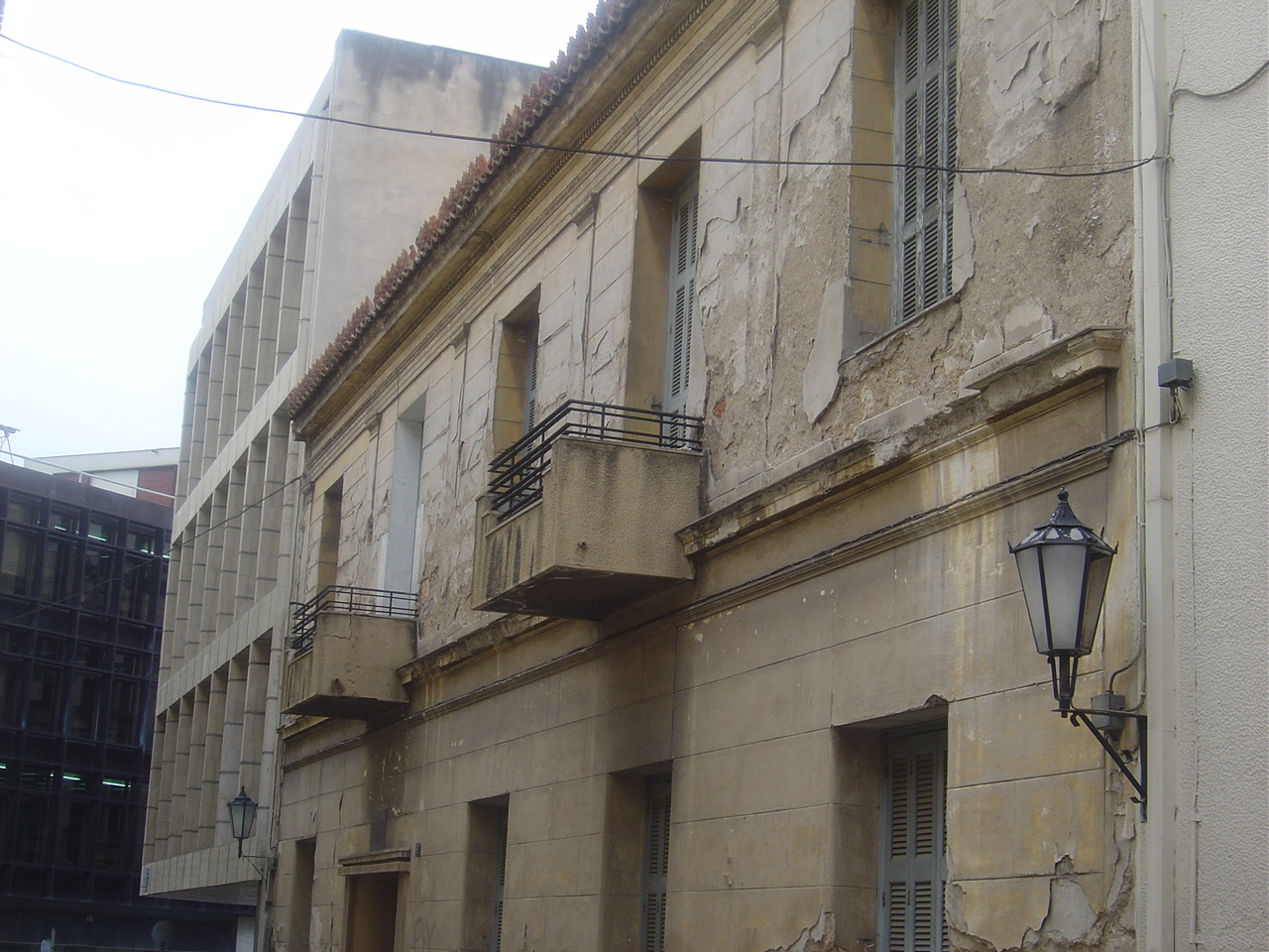 Το σπίτι του Κωστή Παλαμά στην Πλάκα